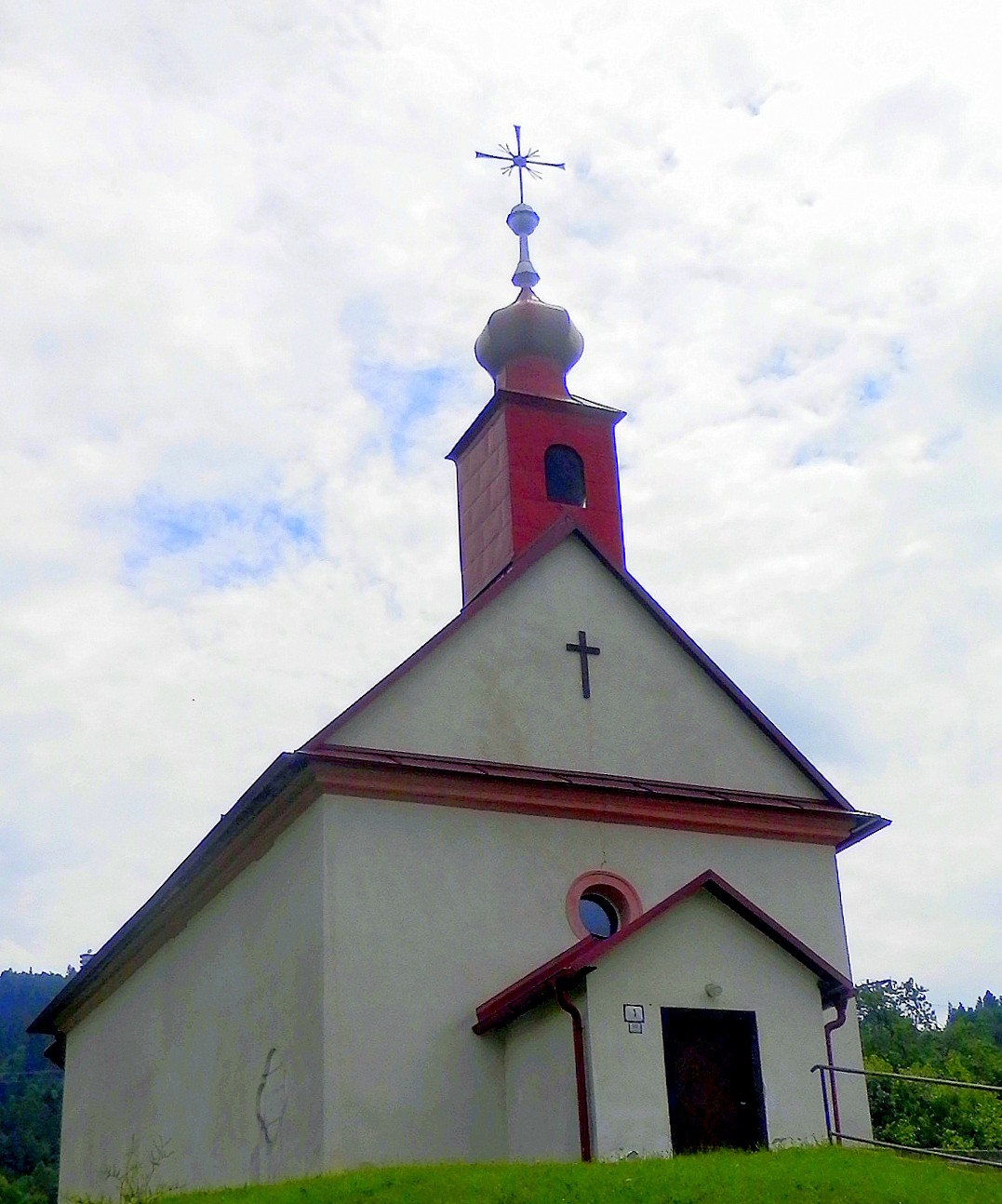 Kostol v obci Korytné, okres Levoča.